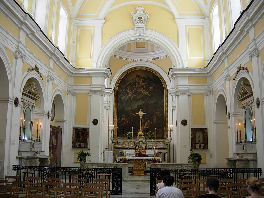 Chiesa di Santa Maria della Mercede e Sant'Alfonso Maria de' Liguori in Napoli Foto personale concessa in PD